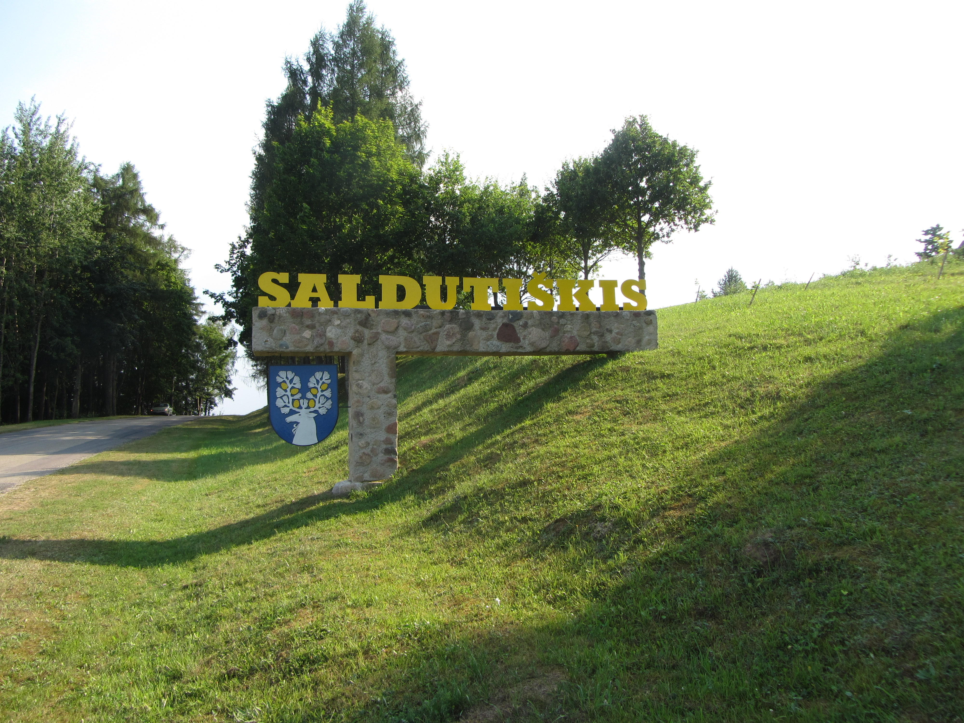 Saldutiškis, Lithuania